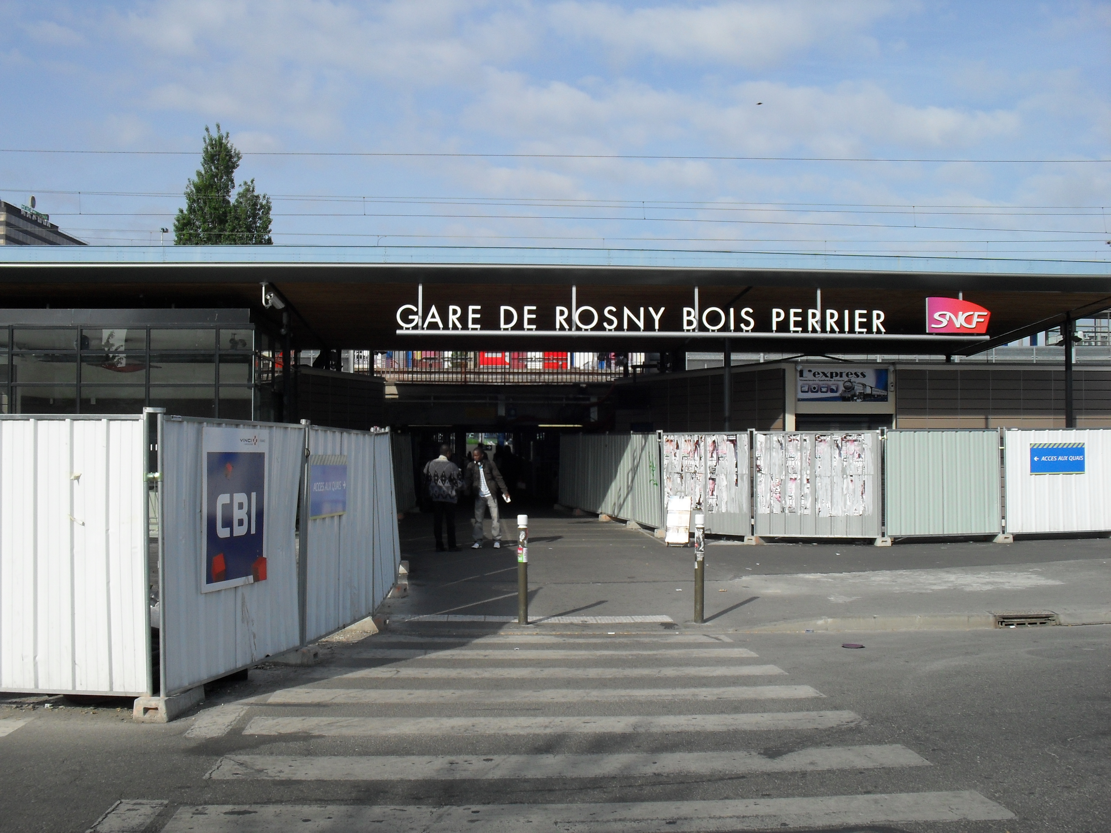 RER E - Gare de Rosny-Bois-Perrier